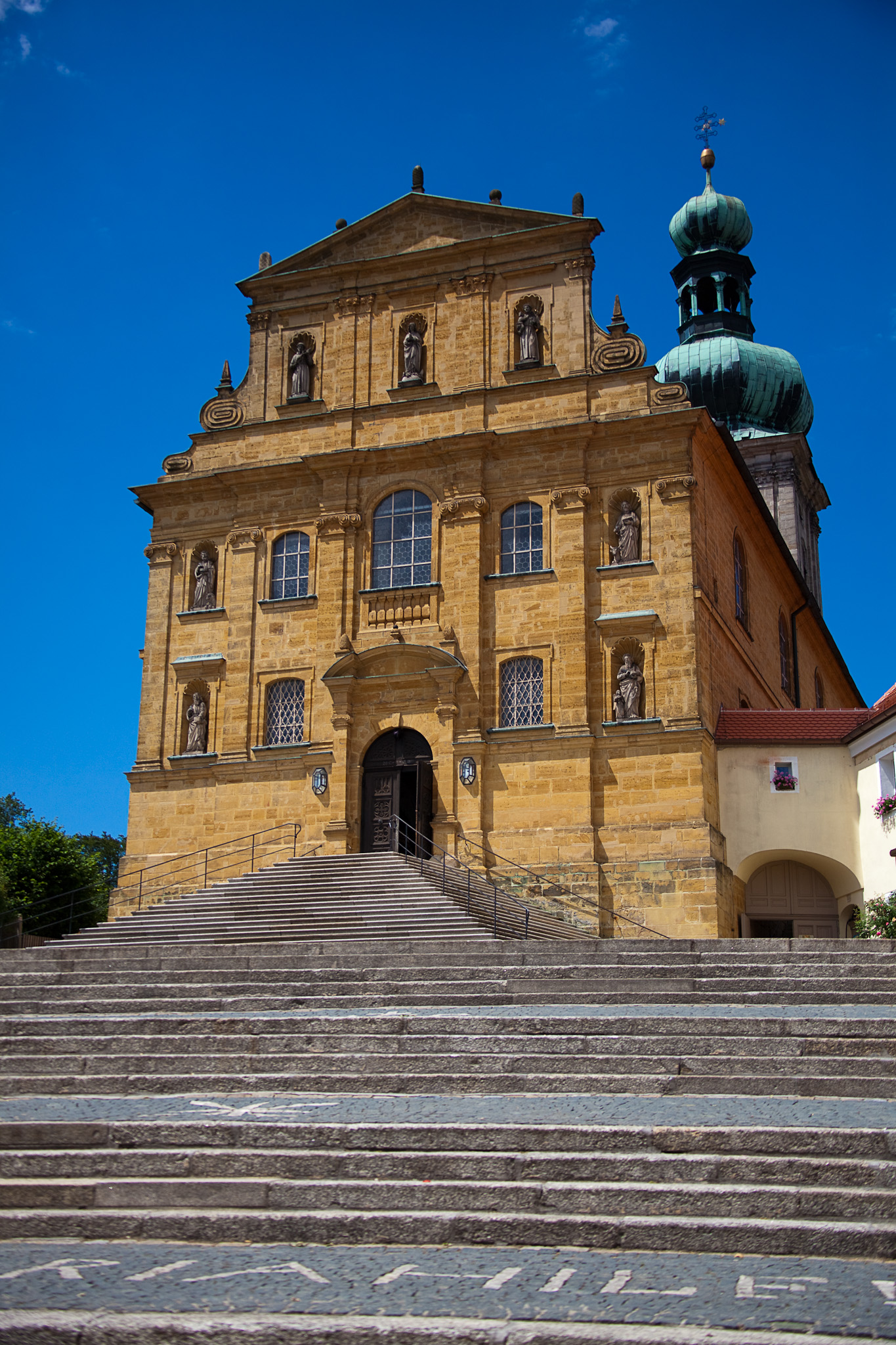 Maria Hilfberg Amberg